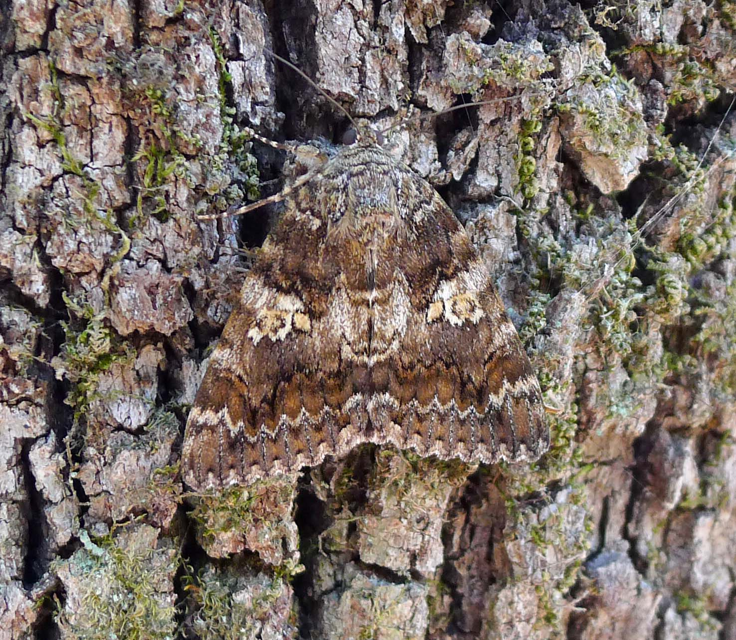 Alcornocales N.P. Andalucia, Spain